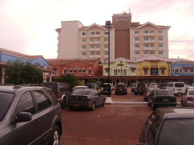 Plaza comercial, Colón, Panamá